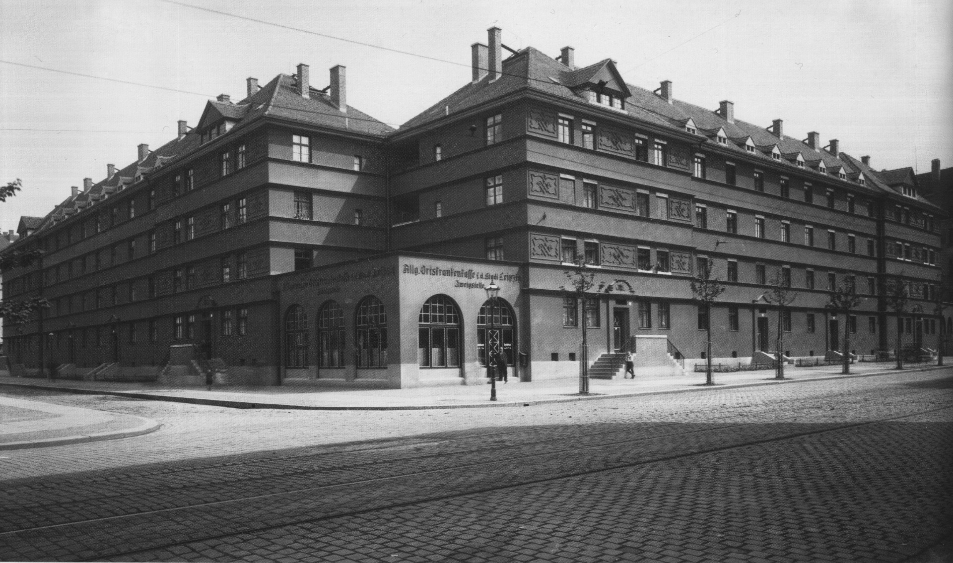 Allgemeine Ortskrankenkasse in der Riebeckstraße 23 /Ecke Adalbertstraße (heute Stammstraße). Architekten Hubert Ritter und Arthur Busse.